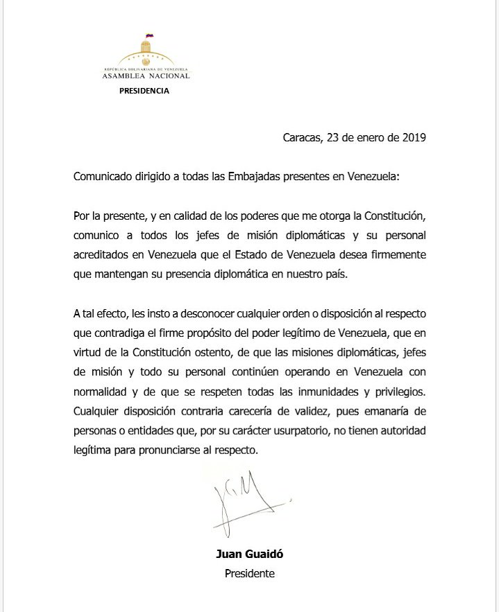 23 Enero 2019 comunicado a los embajadores